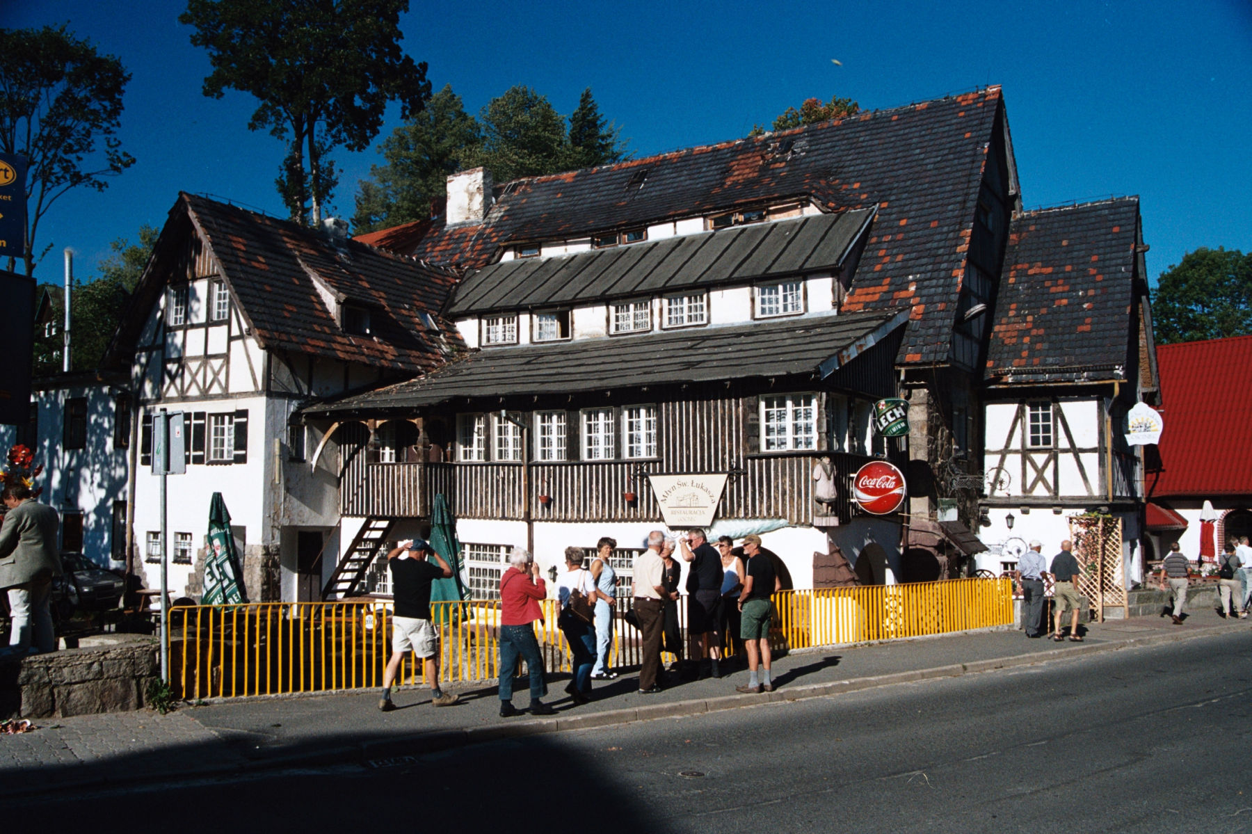 Szklarska Poręba, ul. 1-go Maja 16 - młyn św. Łukasza, obecnie hotel i restauracja „Złota Jama” (zabytek nr 1231/J)